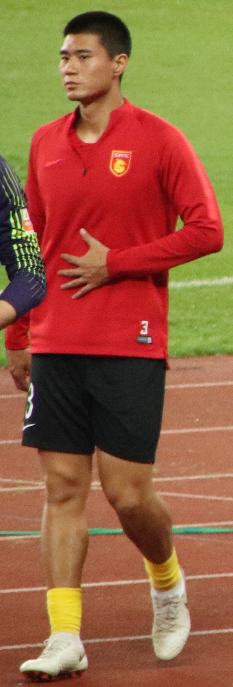 中文（中国大陆）: 河北华夏幸福球员：赵宇豪